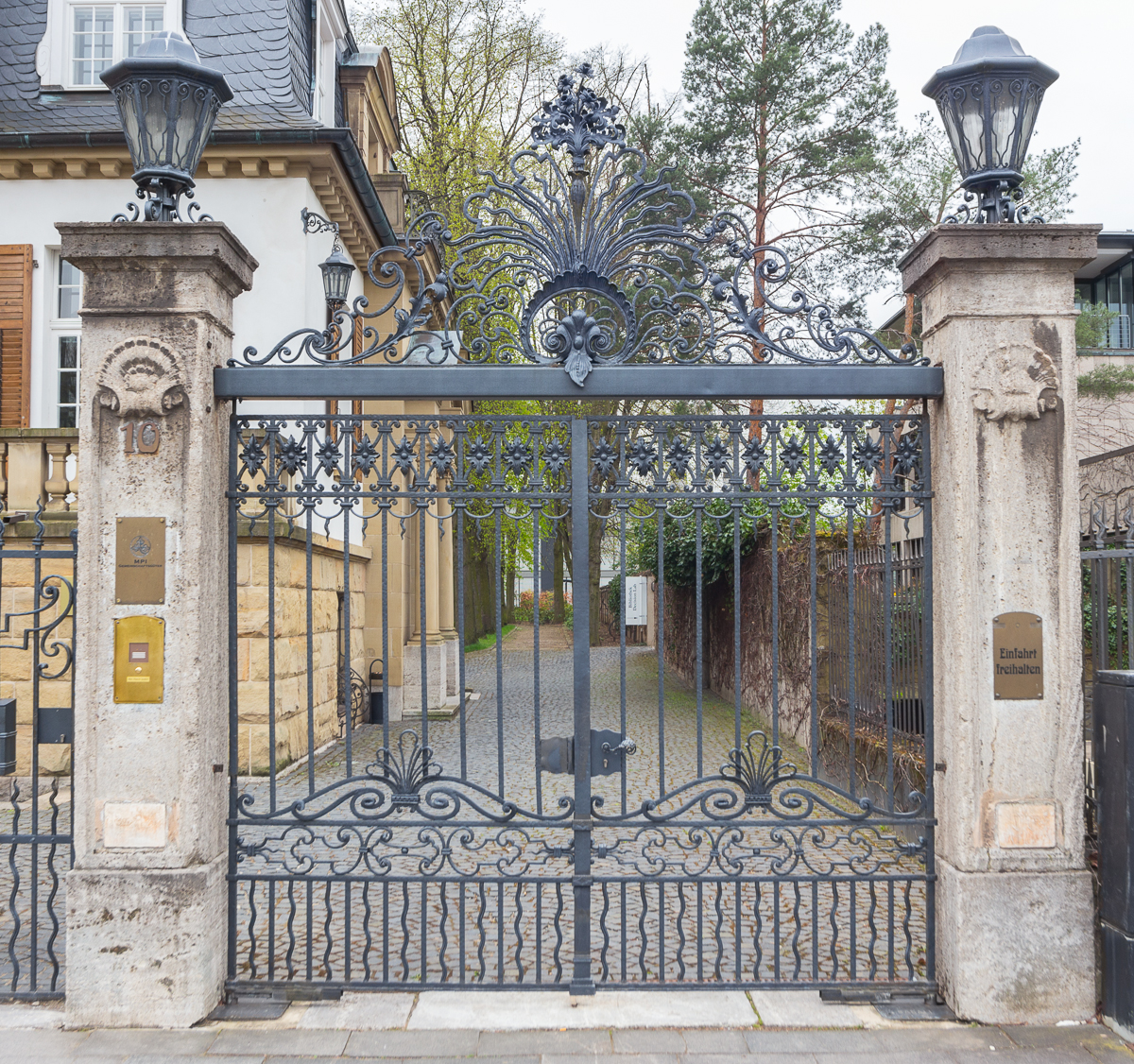 Villa, Kurt-Schumacher-Straße 10, Bonn